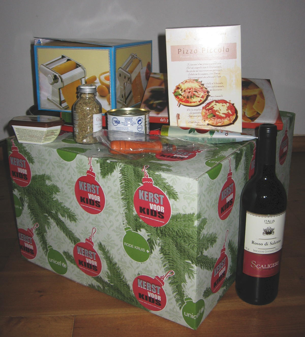 Mijn kerstpakket uitgepakt (Italiaanse sfeer)